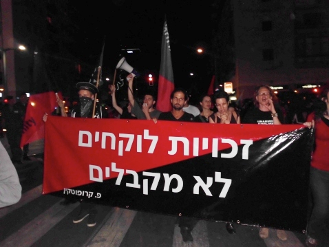 израильская секция М.С.А. на первомайском шествии